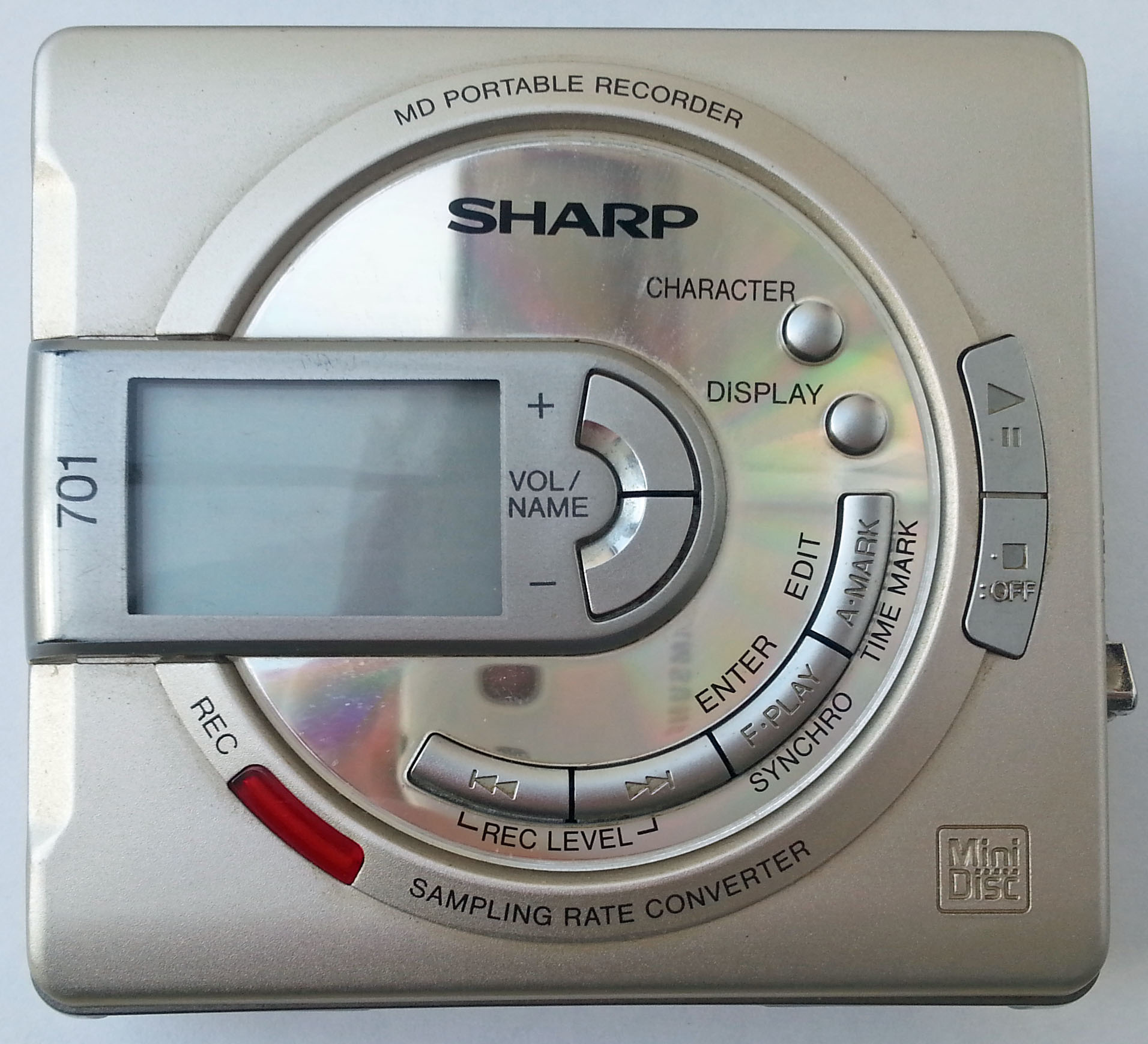 Lecteur enregistreur Mini Disc SHARP MD-MS701H(S)2